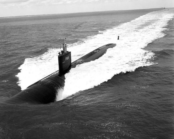 USS Albany (SSN-753)